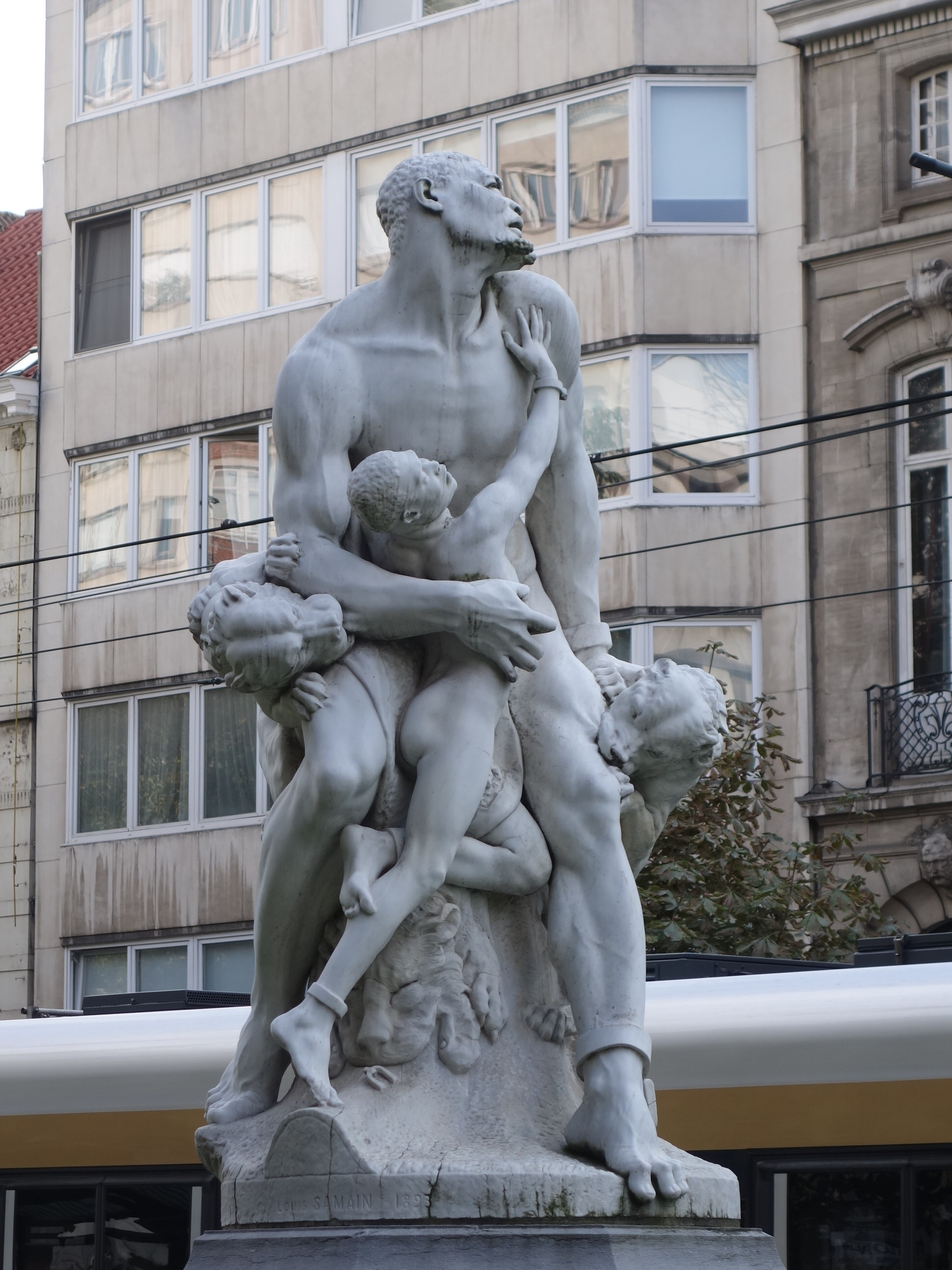 Esclave repris par les chiens, par Louis Samain (1893).